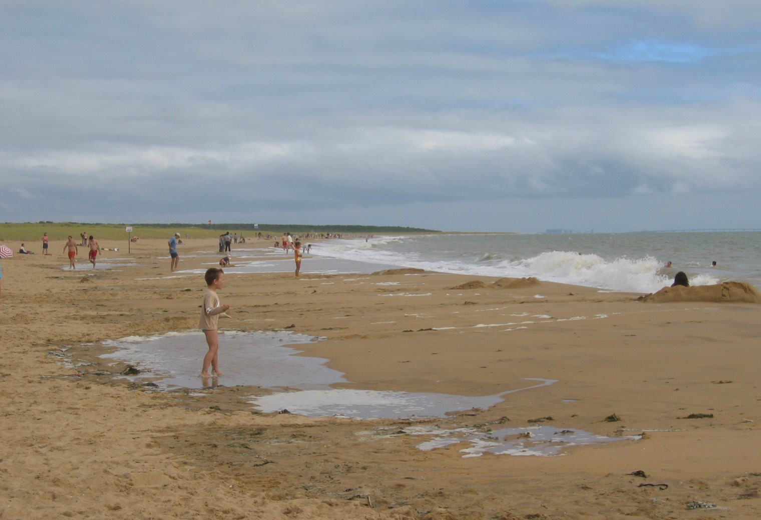 La Faute-sur-Mer. Plage des Bélougas. Vue vers le sud-est. On distingue à l'horizon la forêt à la pointe d'Arcay, les silos du port de la Pallice et le pont de l'Île de Ré. 2007